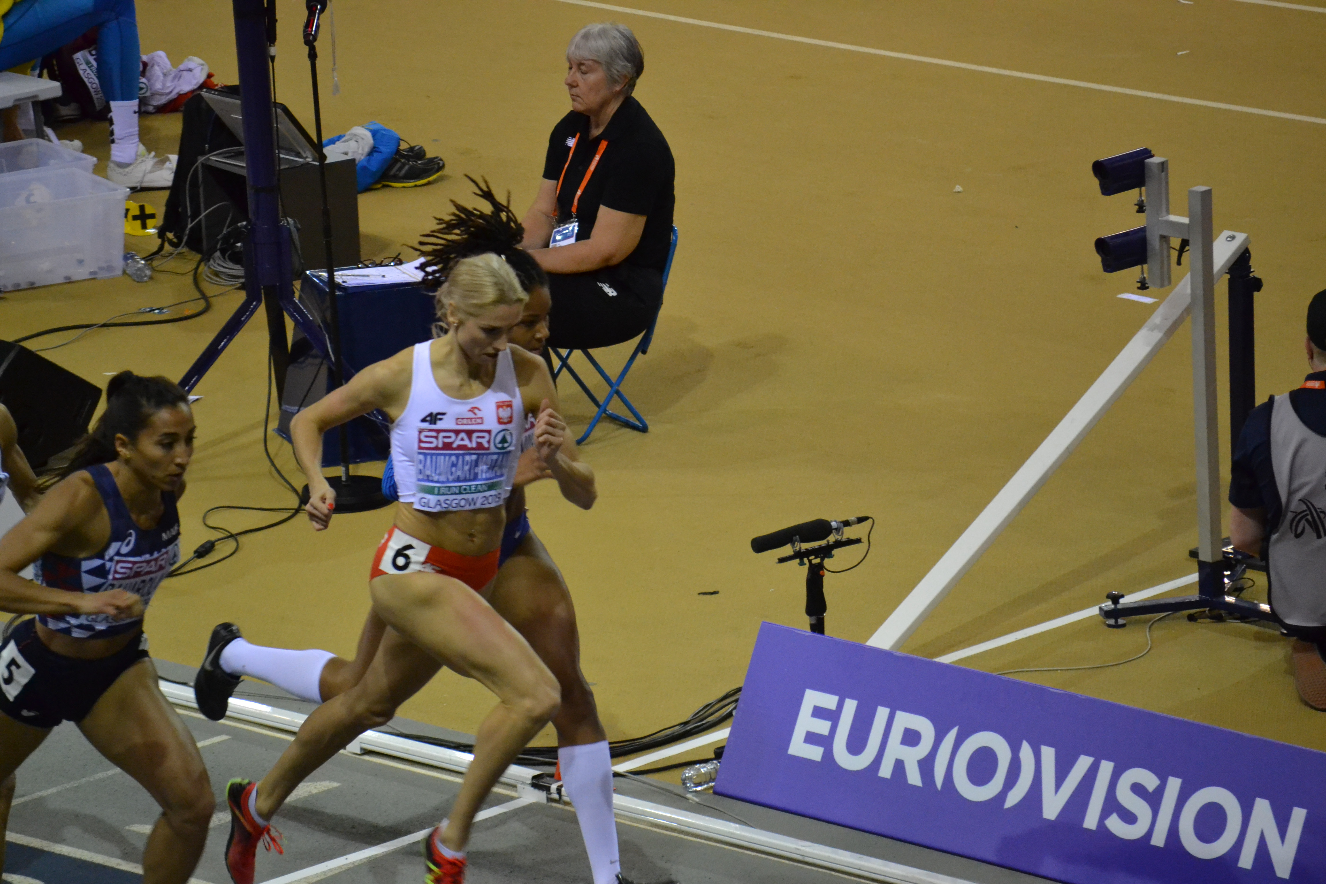 Womens 400m